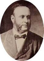 Foto de Maurice Raynaud